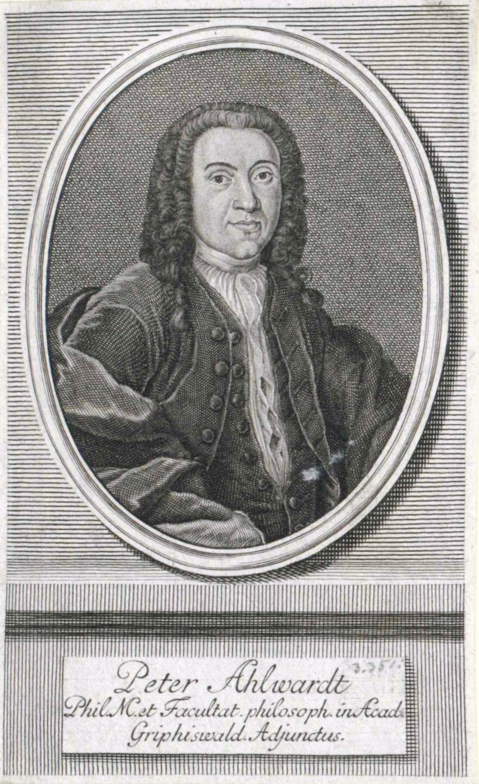 Der Greifswalder Theologe Peter Ahlwardt (1710-1791), "Zuverläßige Nachrichten von dem gegenwärtigen Zustande der Wissenschaften"